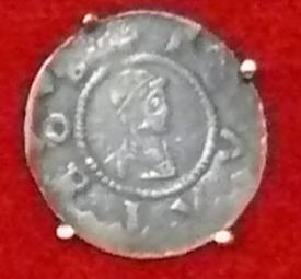 Denár Bořivoje II.